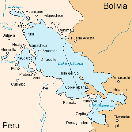 Región del lago Titicaca (Mapa mudo b/w por - Rotulacion, Coloreado y localizaciones por Usuario:Haylli)